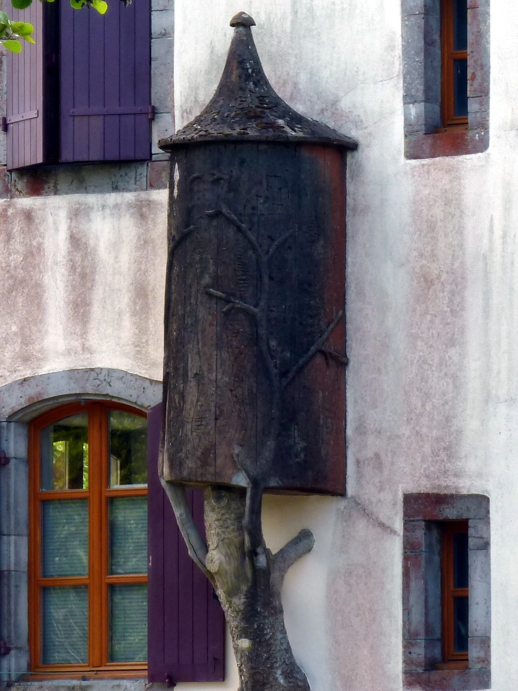 Maison-toilettes_02